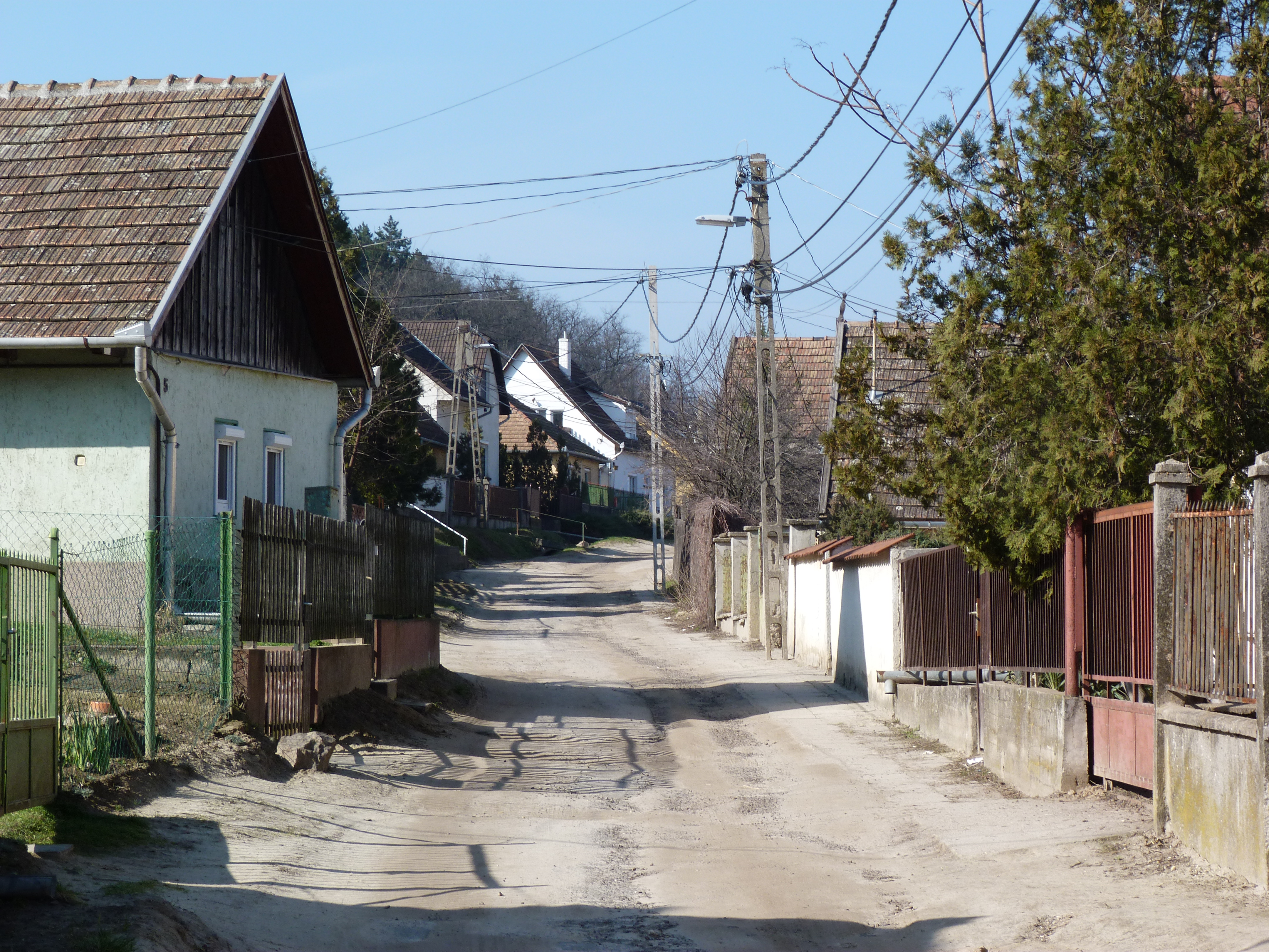 A felvétel 2014. február 26 -án készült Sülysápon. ©© Derzsi Elekes Andor, Budapest, 2014, You are authorised to use these photos and vids under Creative Commons – even for commercial, for profit purposes. Photos must be attributed to Derzsi Elekes Andor. All of the photos and vids in the Metapolisz DVD line are under Creative Commons and can be used even for commercial – for profit – purposes. Recommended Citation Derzsi Elekes Andor: Metapolisz DVD line